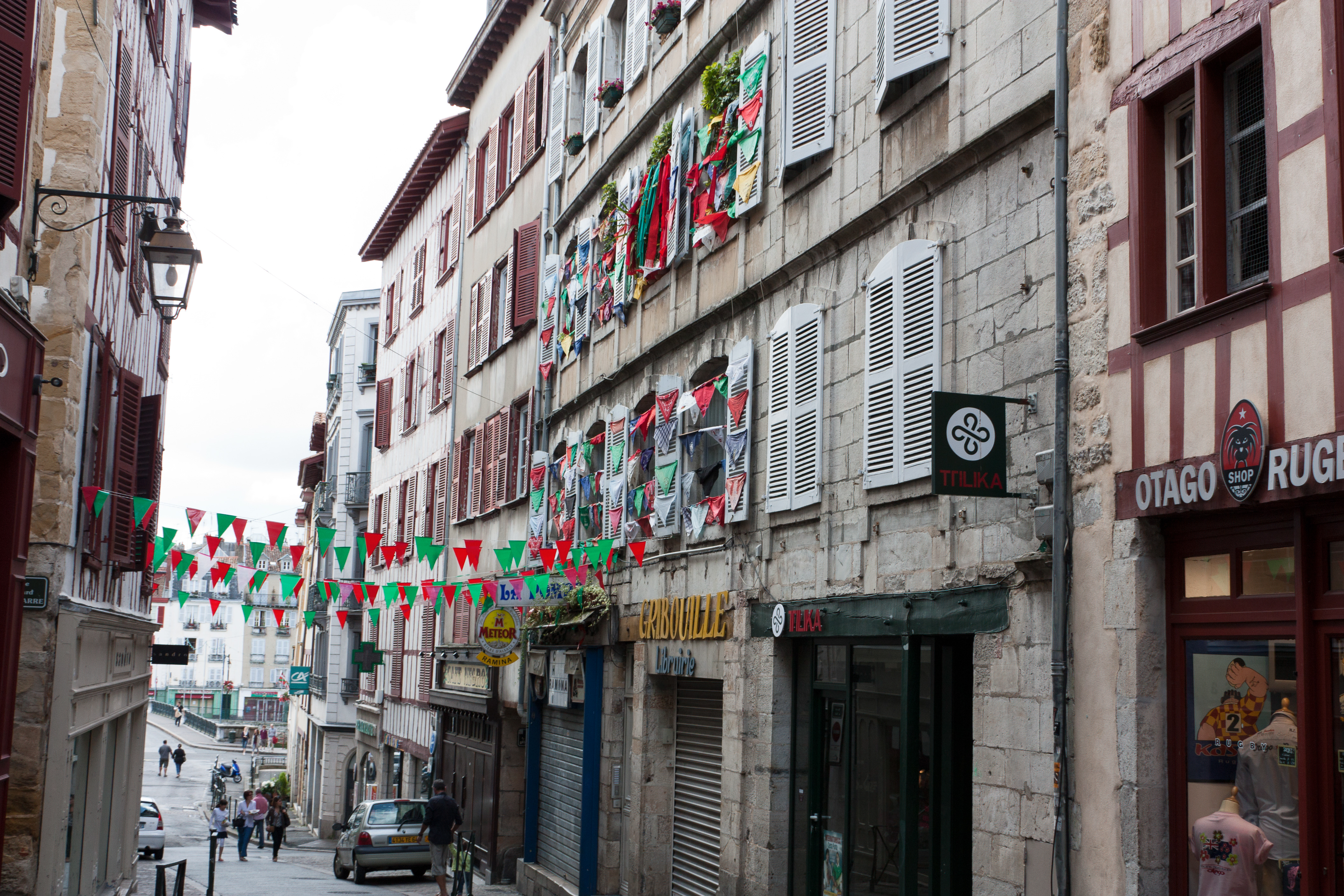 La rue Poissonnerie: l'immeuble du Bar La Ramina et de la librairie Gribouille est décoré d'une collection des foulards des fêtes